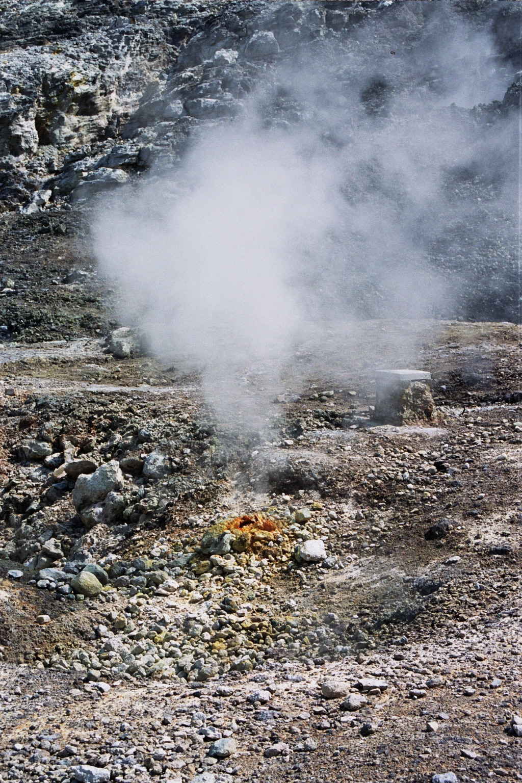 Gas emissie uit de slapende vulkaan op de Flegreische velden nabij Napels, augustus 2003.